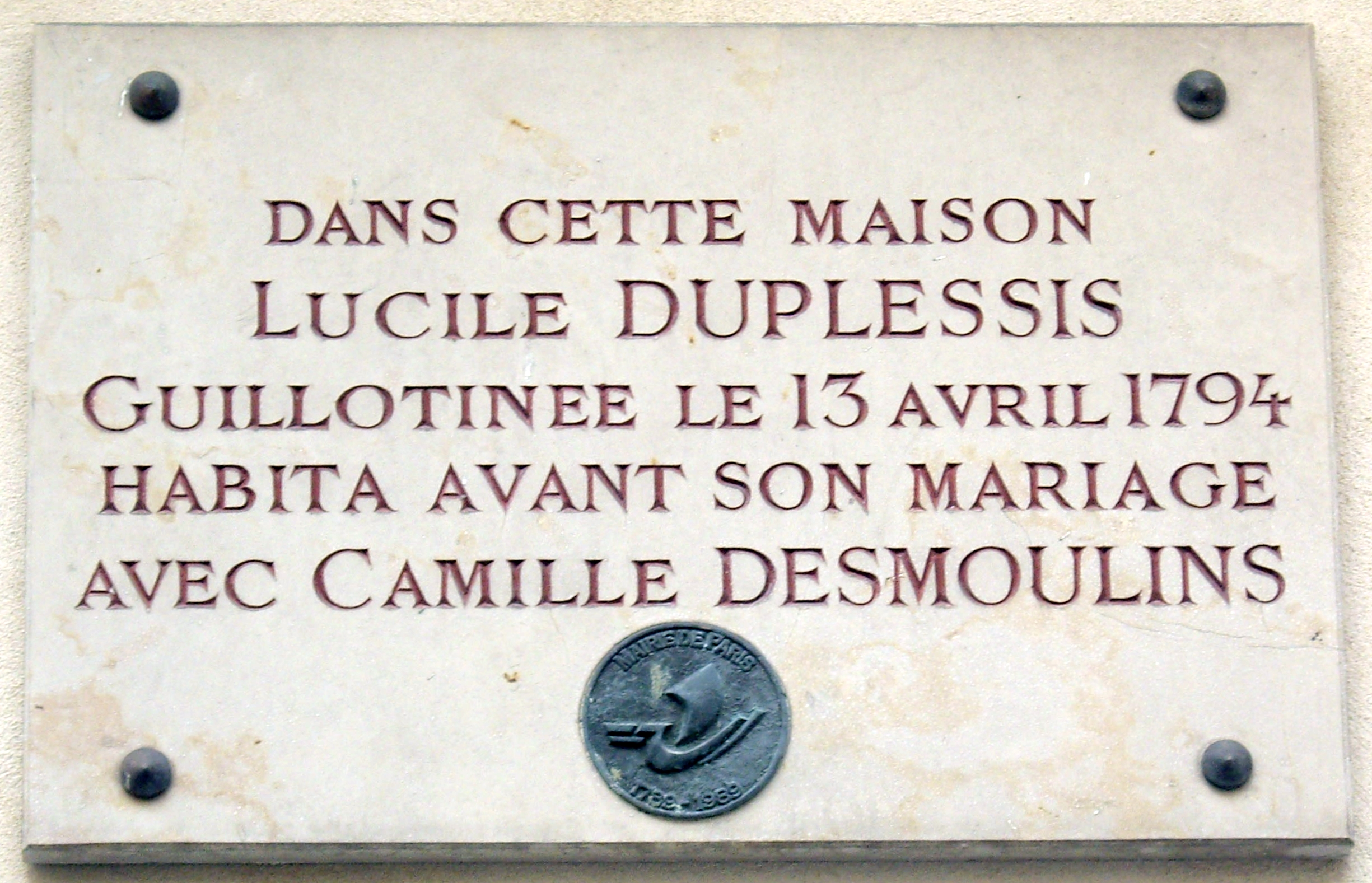 Plaque apposée au n° 22 de la rue de Condé, Paris 6e, où habita Lucile Duplessis (1777-1794) avant son mariage avec Camille Desmoulins (1760-1794). Elle fut guillotinée le 13 avril 1794, huit jours après lui.